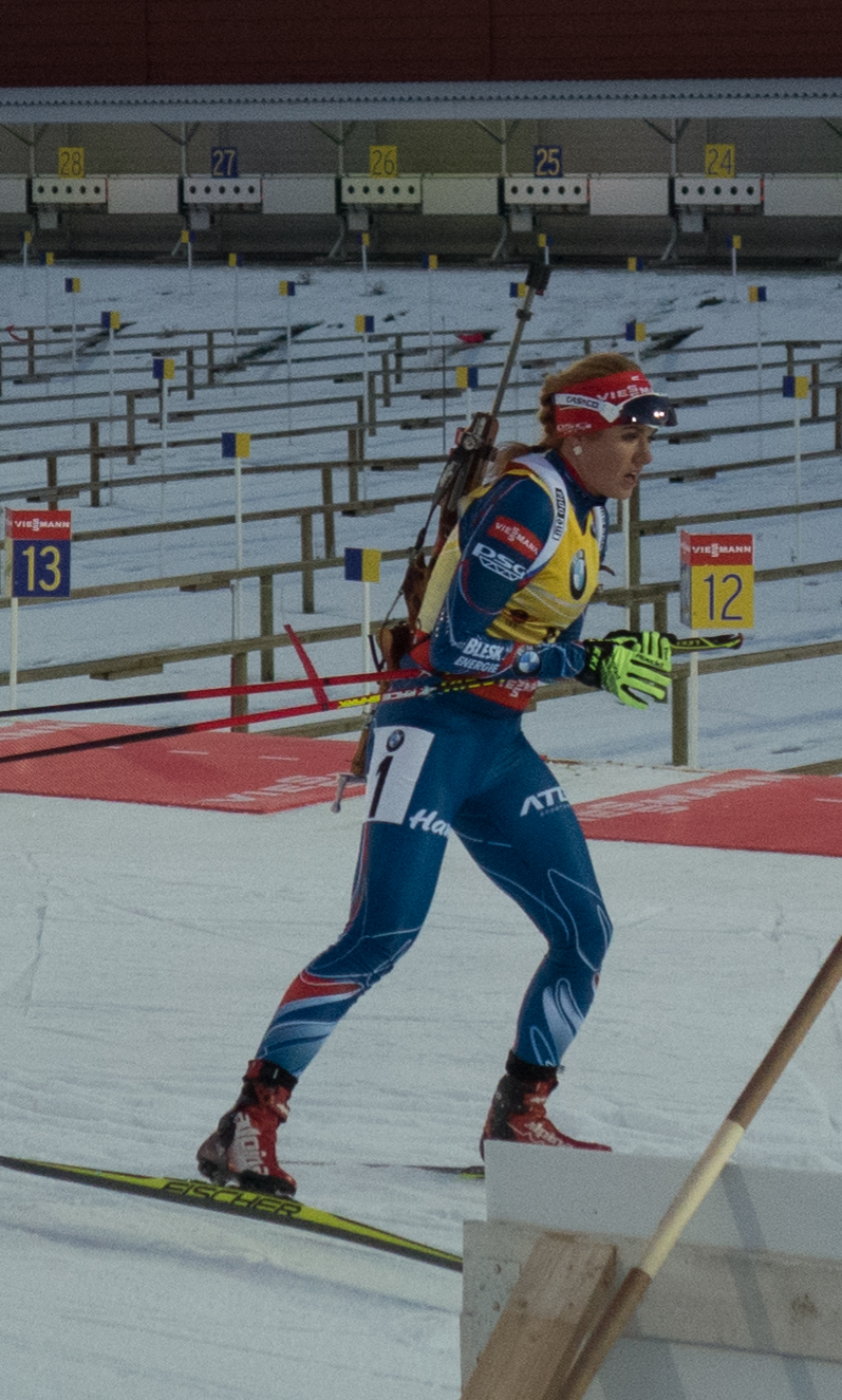 Gabriella Soukalova i Jaktstarten vid Världscupen i Östersund